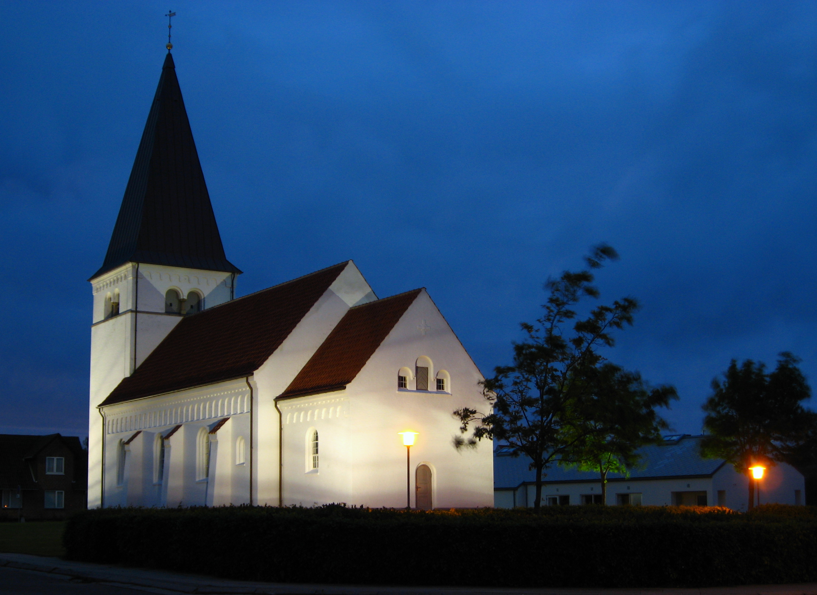 Sindal Kirke om natten